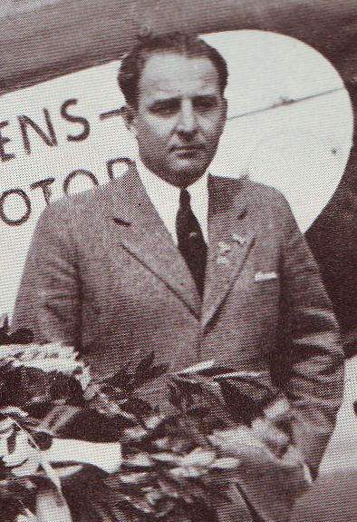 Karl Schwabe. Willy Sachs: Königlich Schwedischer Konsul Willy Sachs (rechts) und der ehemalige Boxweltmeister Hans Breitensträtter begrüßen in Tempelhof den Verfasser bei der Rückkehr von seinem 1. Afrikaflug